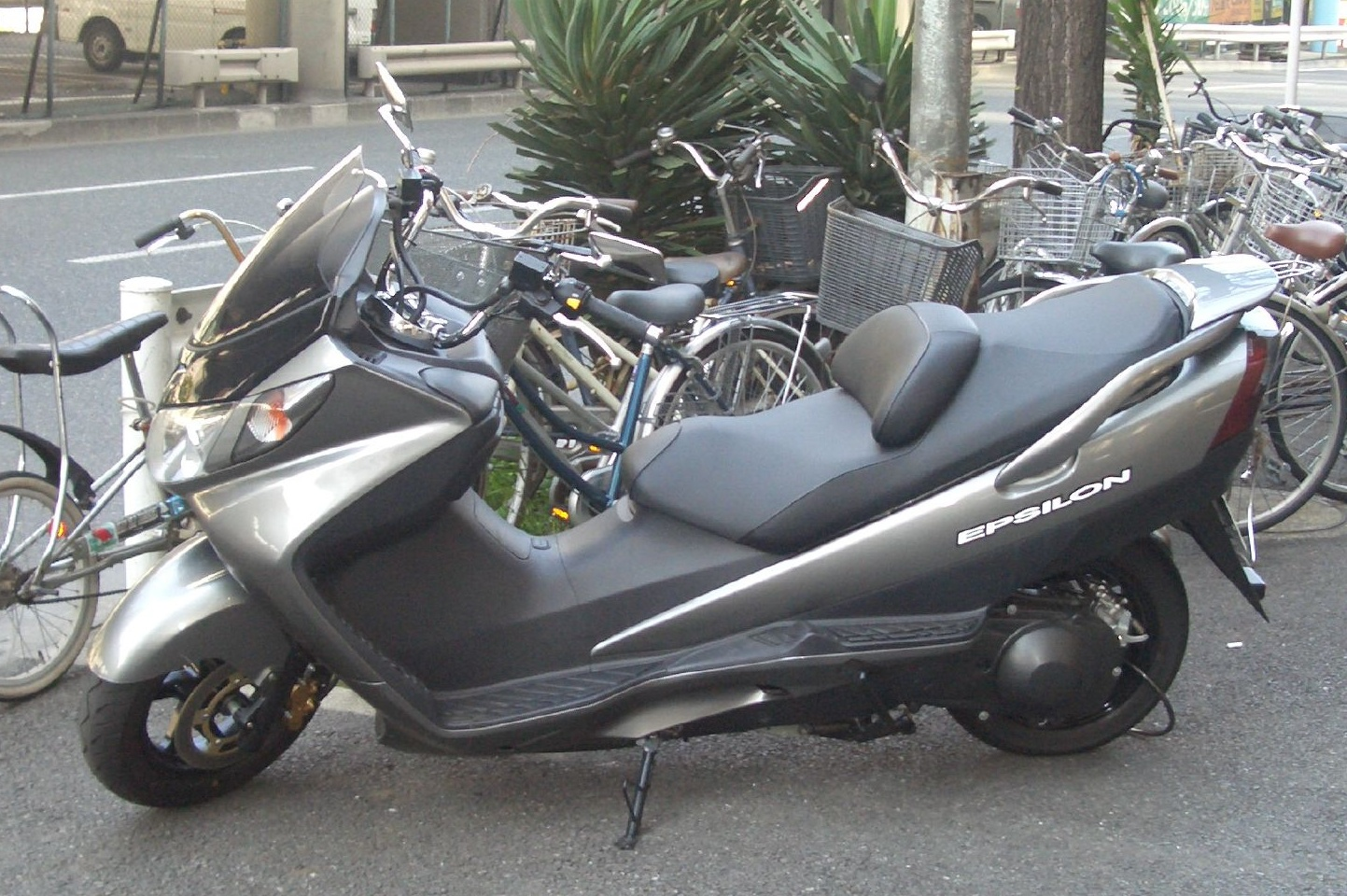 Cool Bike Kawasaki EPSILON 250(Suzuki SKYWAVE OEM)